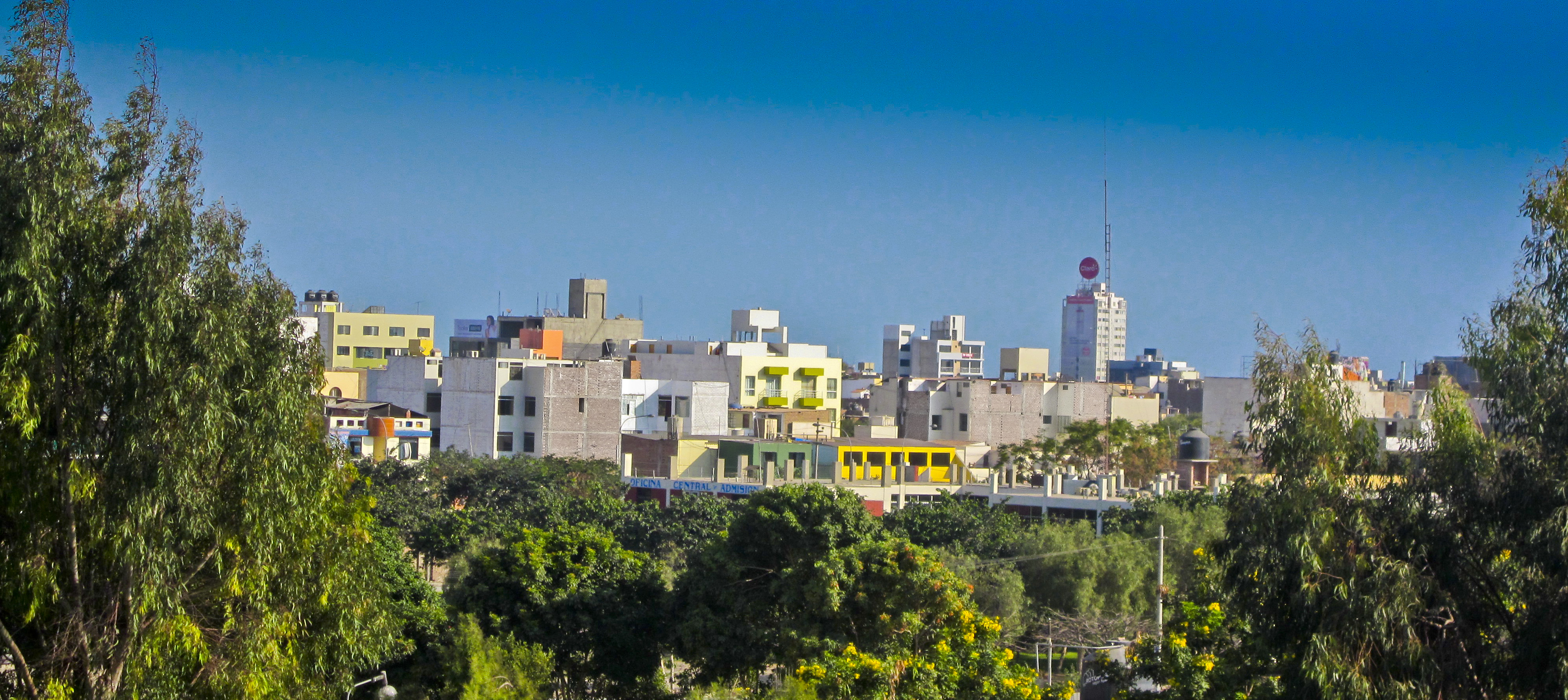 Vista panorámica de la ciudad de Trujillo ,La Libertad - Perú